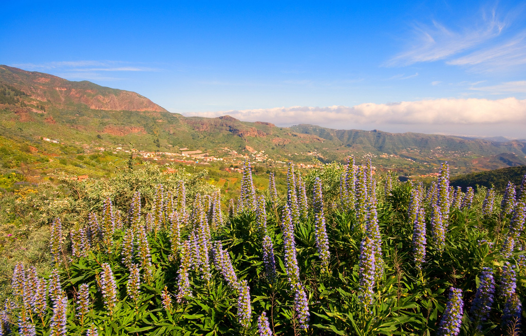 Vista de Valsequillo de Gran Canaria con tajijnaste azul en primer plano